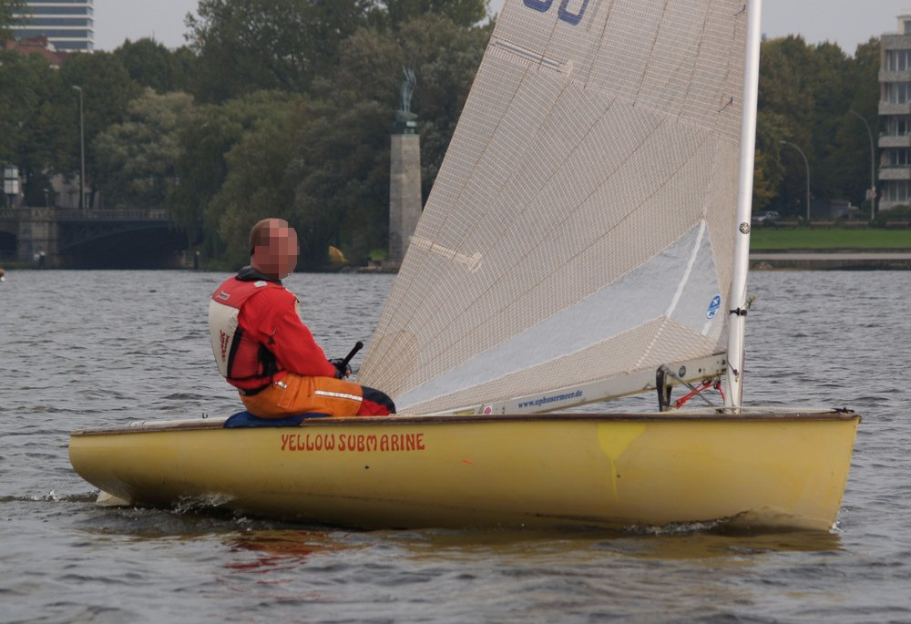 Finn